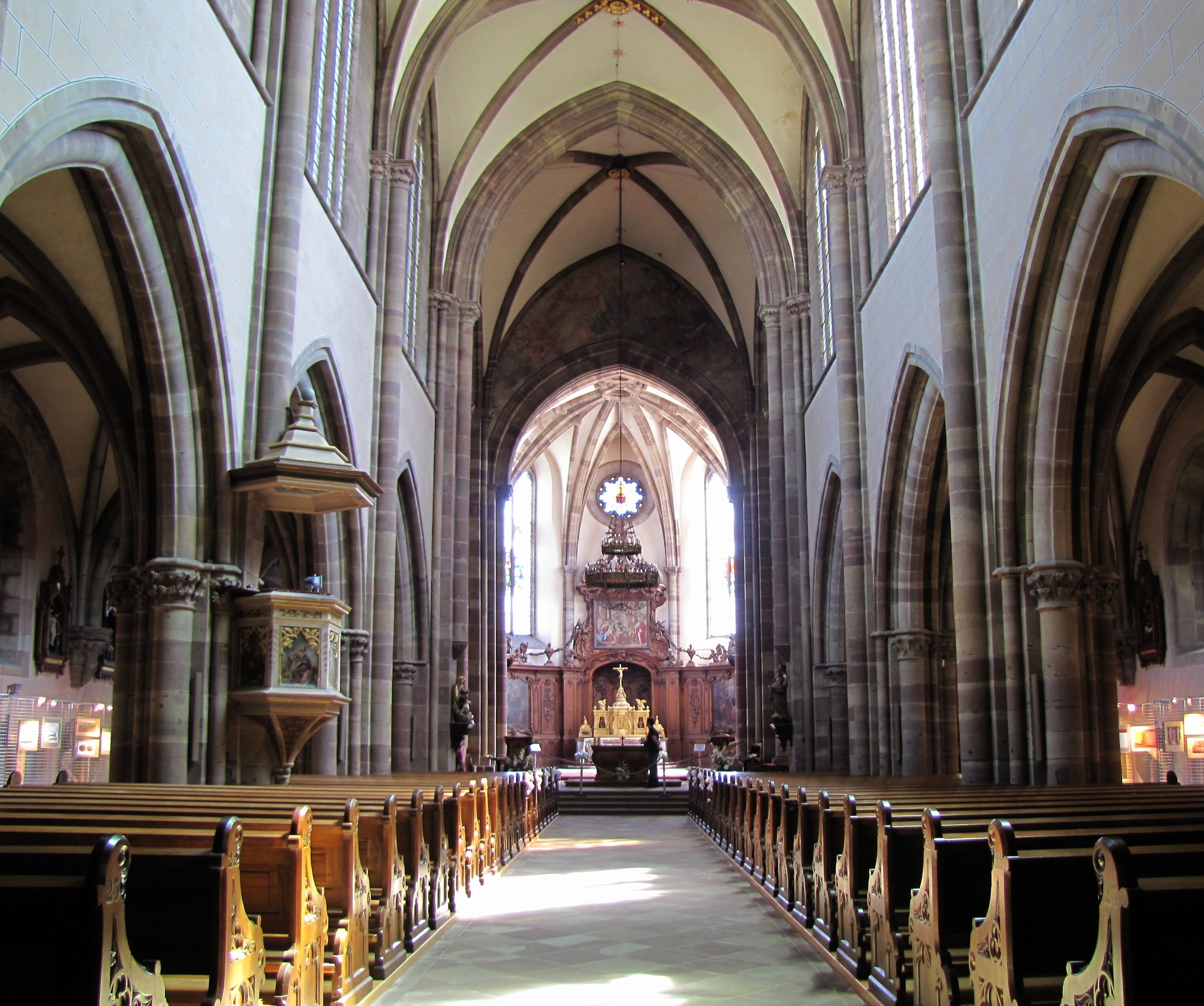 Alsace, Bas-Rhin, Abbatiale Saint-Étienne de Marmoutier (PA00084783, IA67007715). Vue intérieure de la nef vers le chœur.